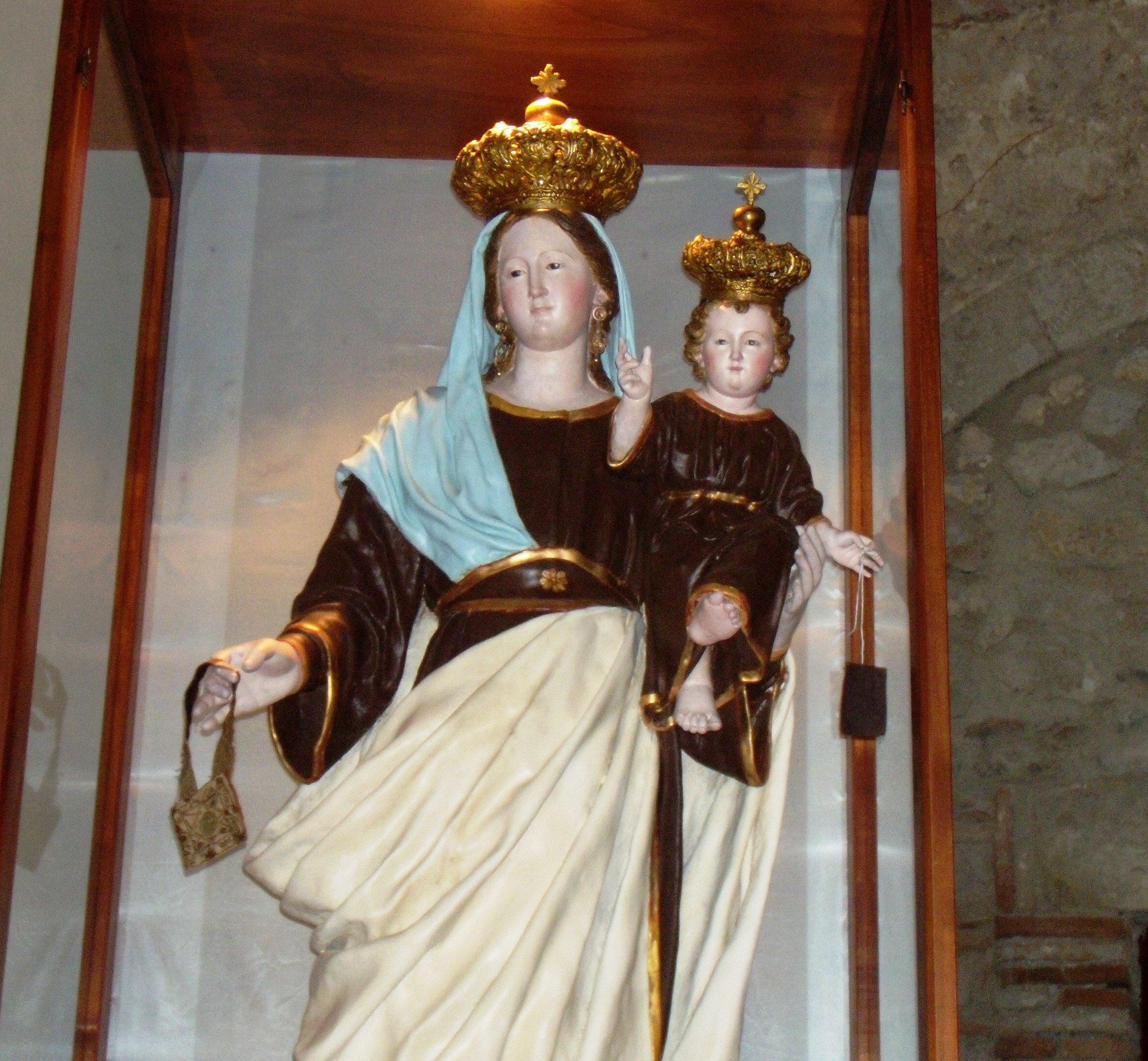 Statua della Madonna del Carmine nell'omonima chiesa in Cerreto Sannita (Benevento).